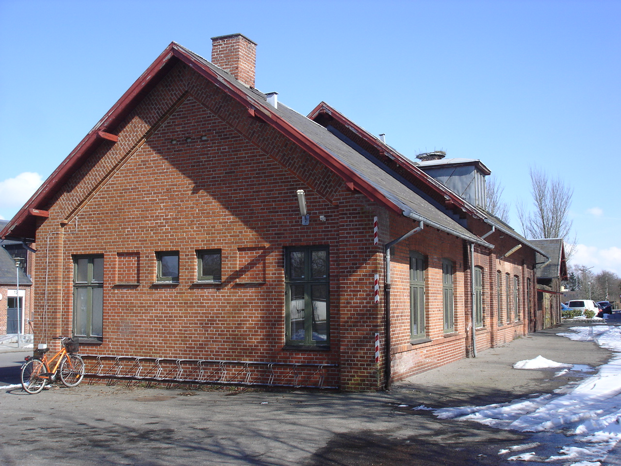 Nørager Station, sporsiden fra V